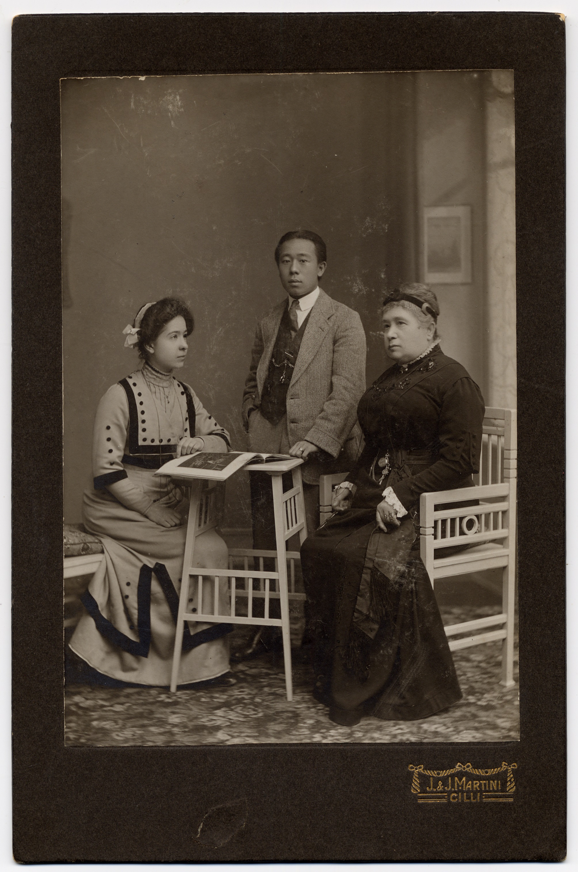 Alma M. Karlin z zaročencem Hsu Singjung Lungom in materjo.